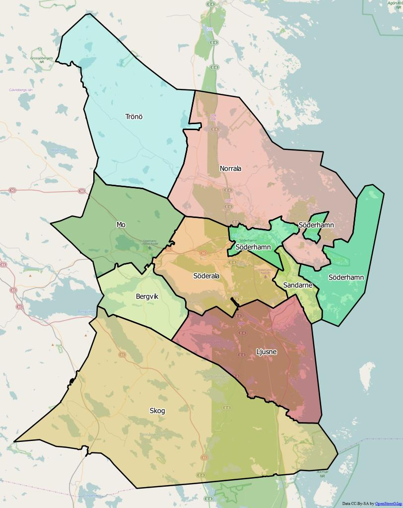 Distriktsindelningen i Söderhamns kommun World file: 120.30865047566541648 0 0 -120.30865047566541648 1839165.83627955359406769 8753164.16801924630999565